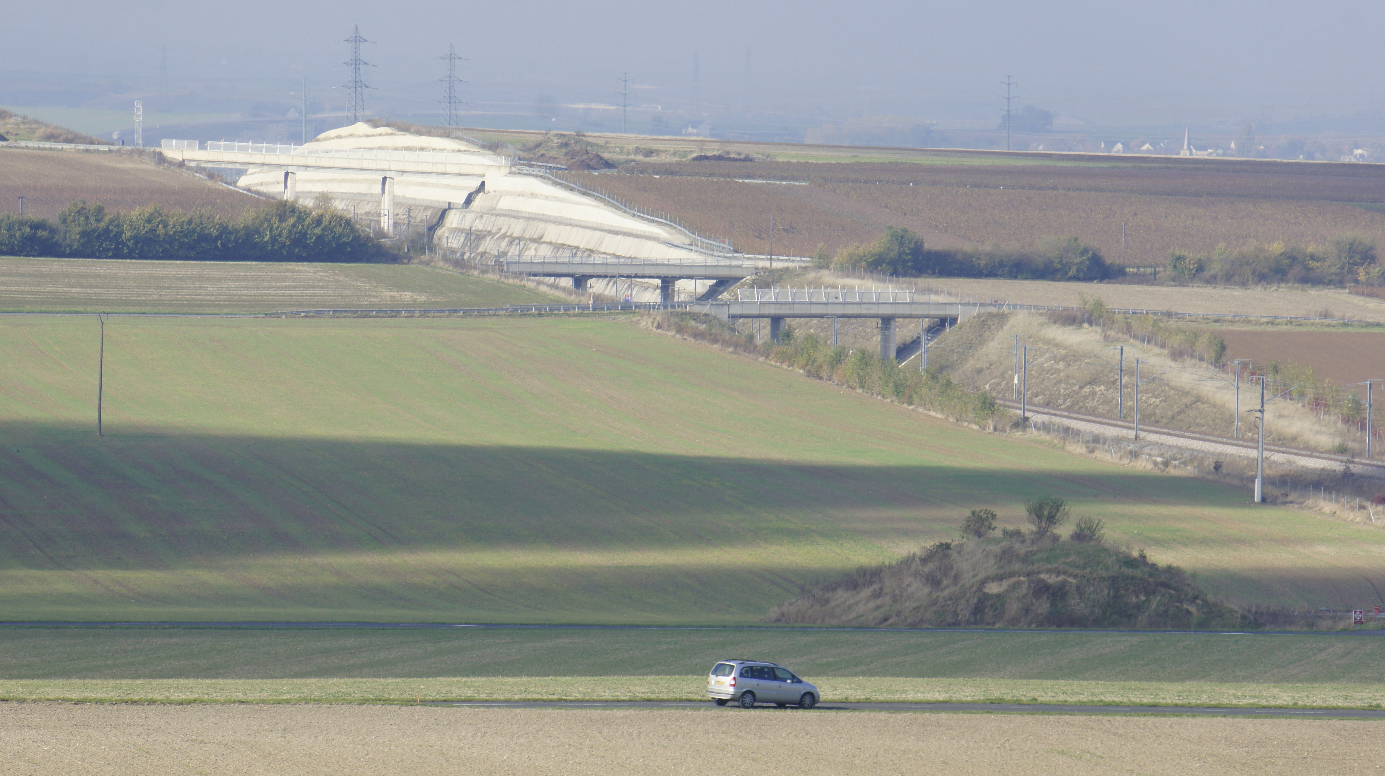 Tranchée de la LGV sur le territoire de Montbré.